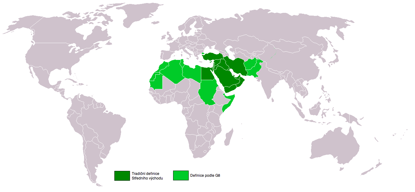 Mapa států Blízkého východu a Širšího blízkého východu